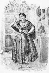 La china, aparecida en Los mexicanos pintados por sí mismos (1854)